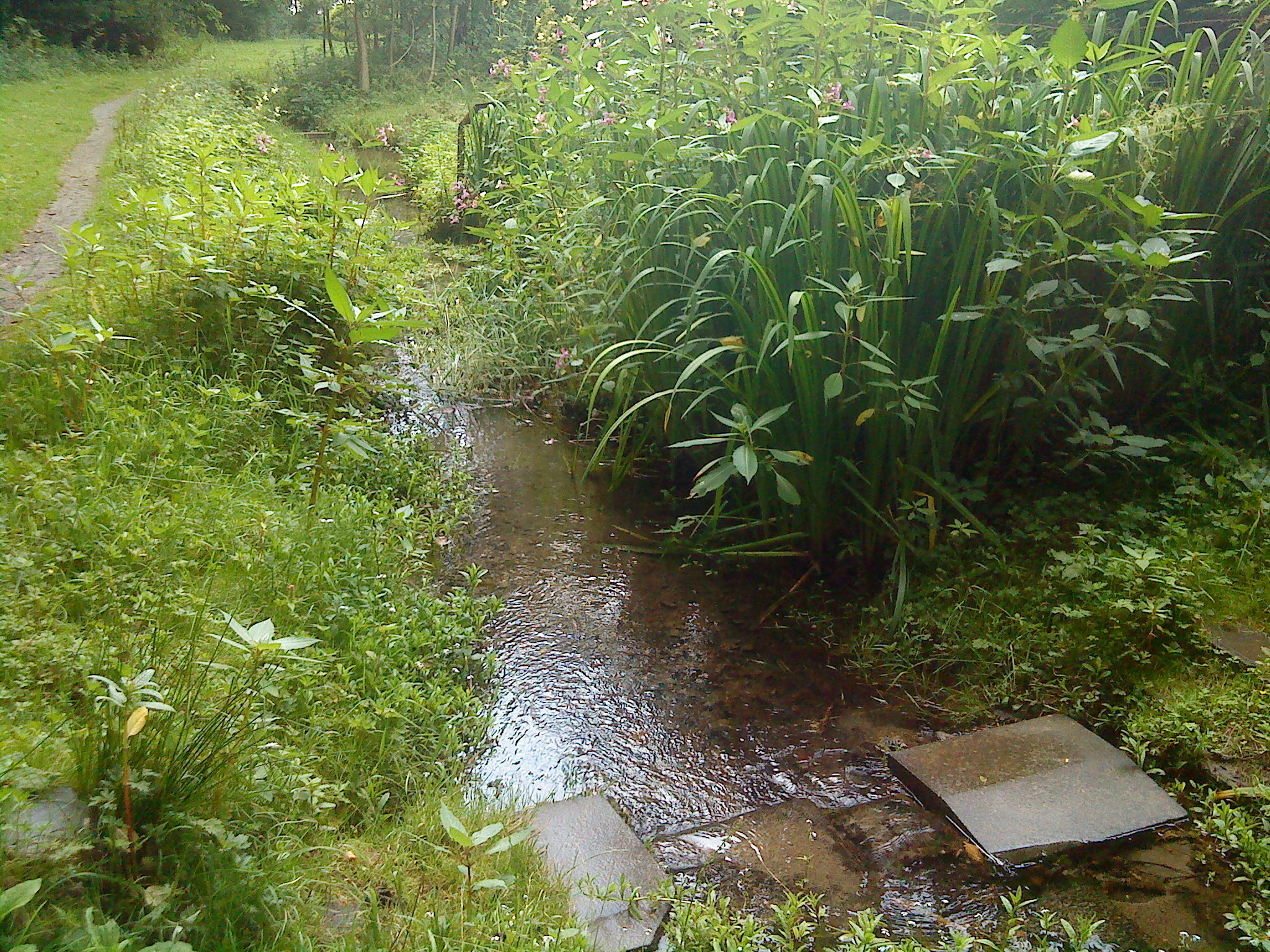 Die Strunde nach ihrer Quelle in Herrenstrunden